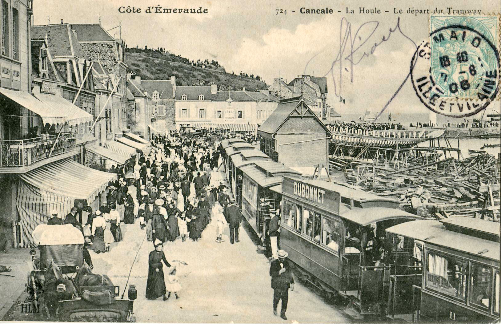 Carte postale ancienne éditée par HLM, collection "Côte d'émeraude", n°724 :CANCALE - La Houle - Le départ du Tramway